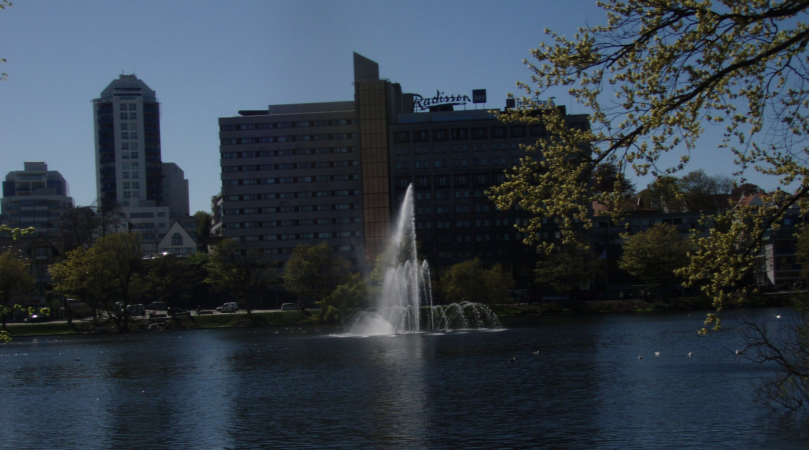 Breiavatnet, Stavanger, May 2007